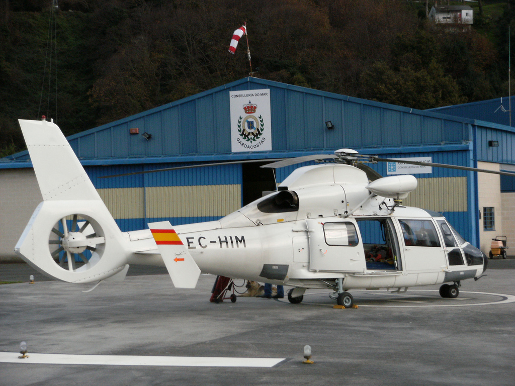 El EC-HIM, AS-365N-2 Dauphin 2 (c/n 6478) fue el antiguo PESCA II hasta la llegada del Sikorsky S-76C+ Spirit , matriculado como EC-JET. Desde que dejó el Helipuerto Costa Norte, pasó a servir para Salvamento Marítimo, como HELIMER 207, desde el Aeropuerto de Almeria. Pero al parecer, el Sikorsky se encuentra en mantenimiento... a si que, al igual que el turrón, el anterior Pesca II vuelve a casa por navidad.